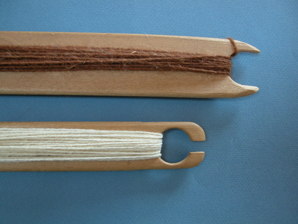 foto mia personale, 2007 Categoria:Immagini sulla tessitura